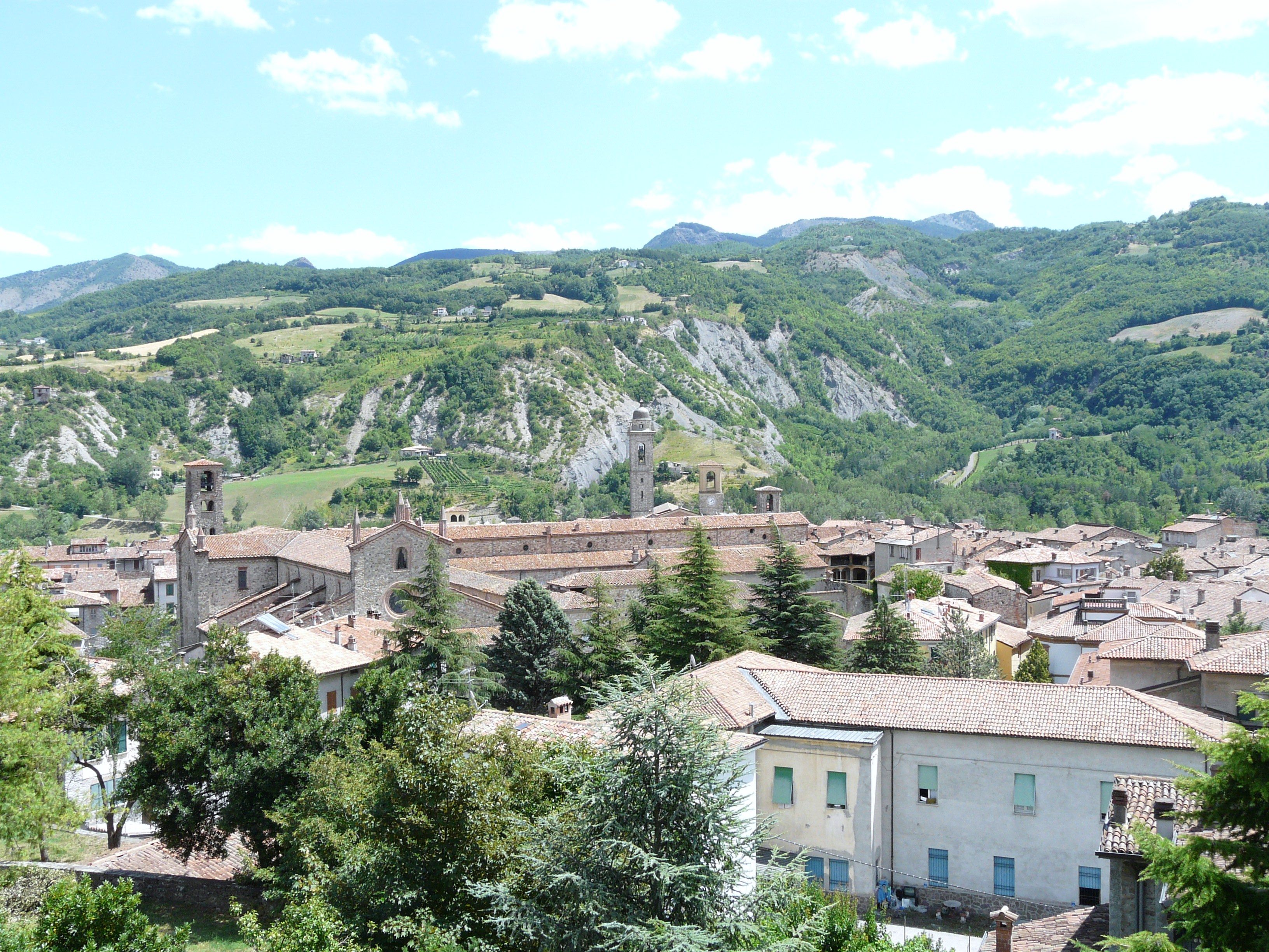 Bobbio, Emilia-Romagna, Italia